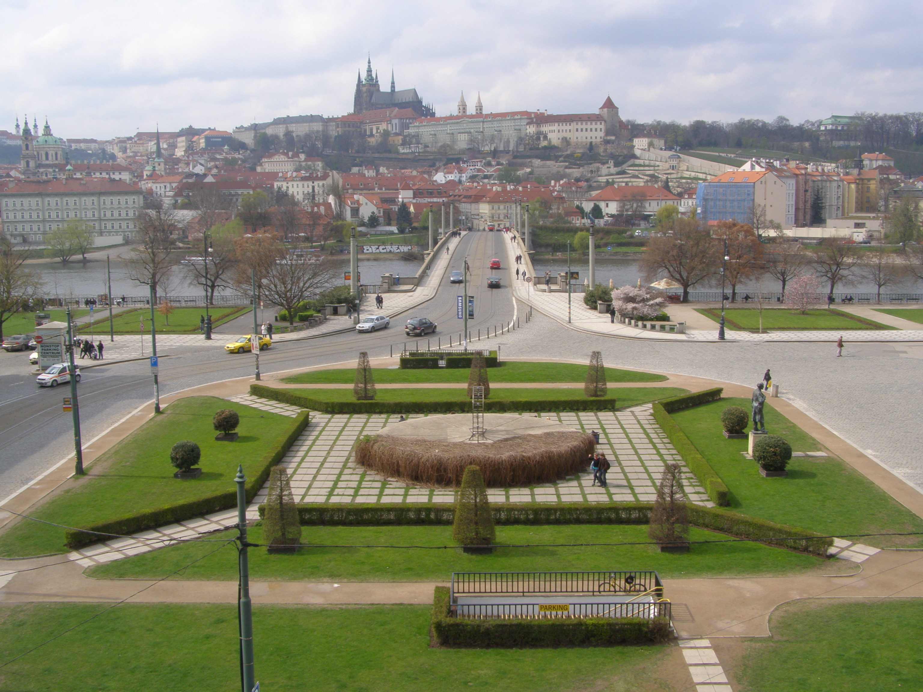 Praha, Staré Město, pohled z Filozofické fakulty na Náměstí Jana Palacha, v pozadí Mánesův most, Malá Strana a Pražský hrad